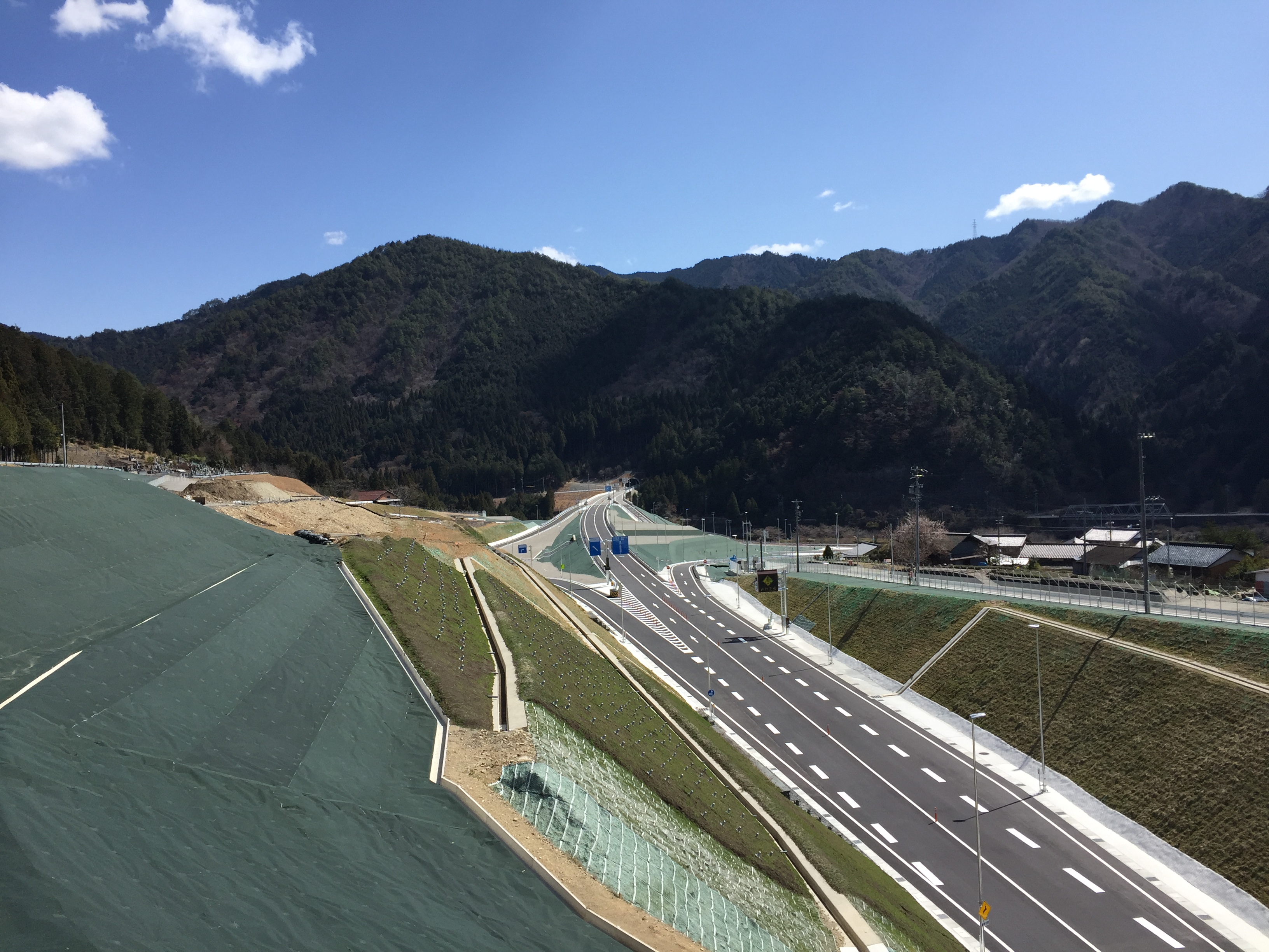 濃飛横断自動車道金山インター